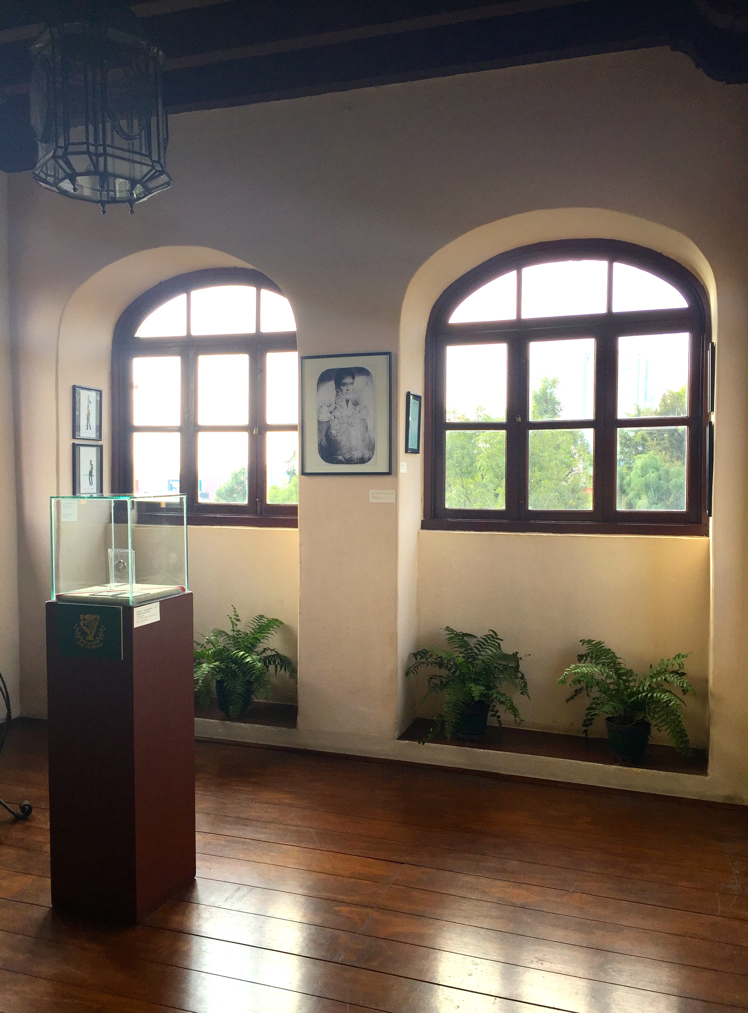 Esta ubicado en el tercer nivel de la Casa del Risco. Desde este mirador se alcanza a ver hasta el Barrio de la Padierna, esto permitió ver el avance de los yankis durante la invasión norteamericana.